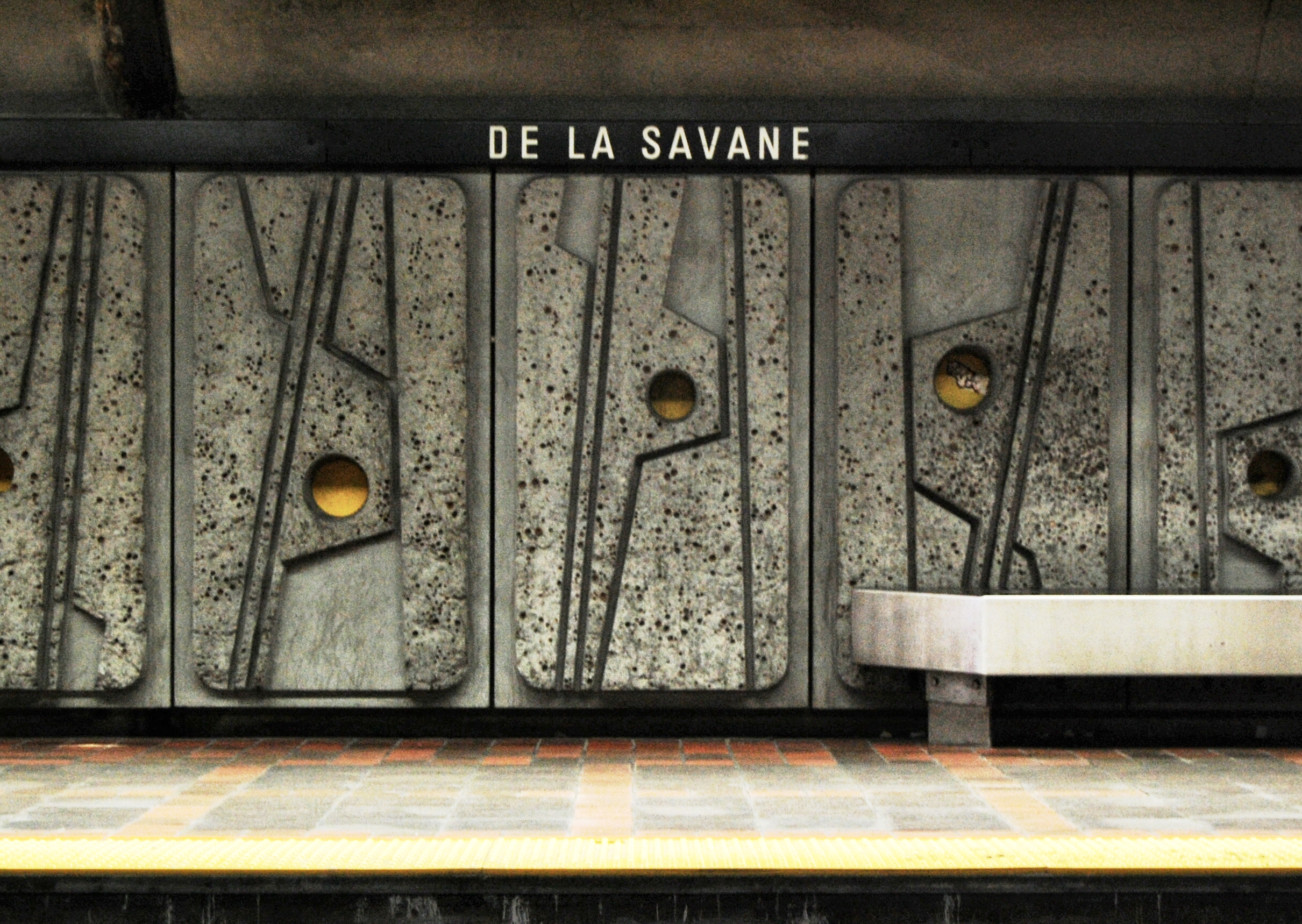 Banquettes de la station De la Savane du Métro de Montréal